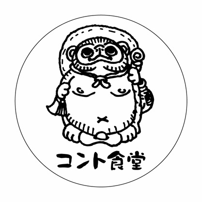 コント食堂ロゴ